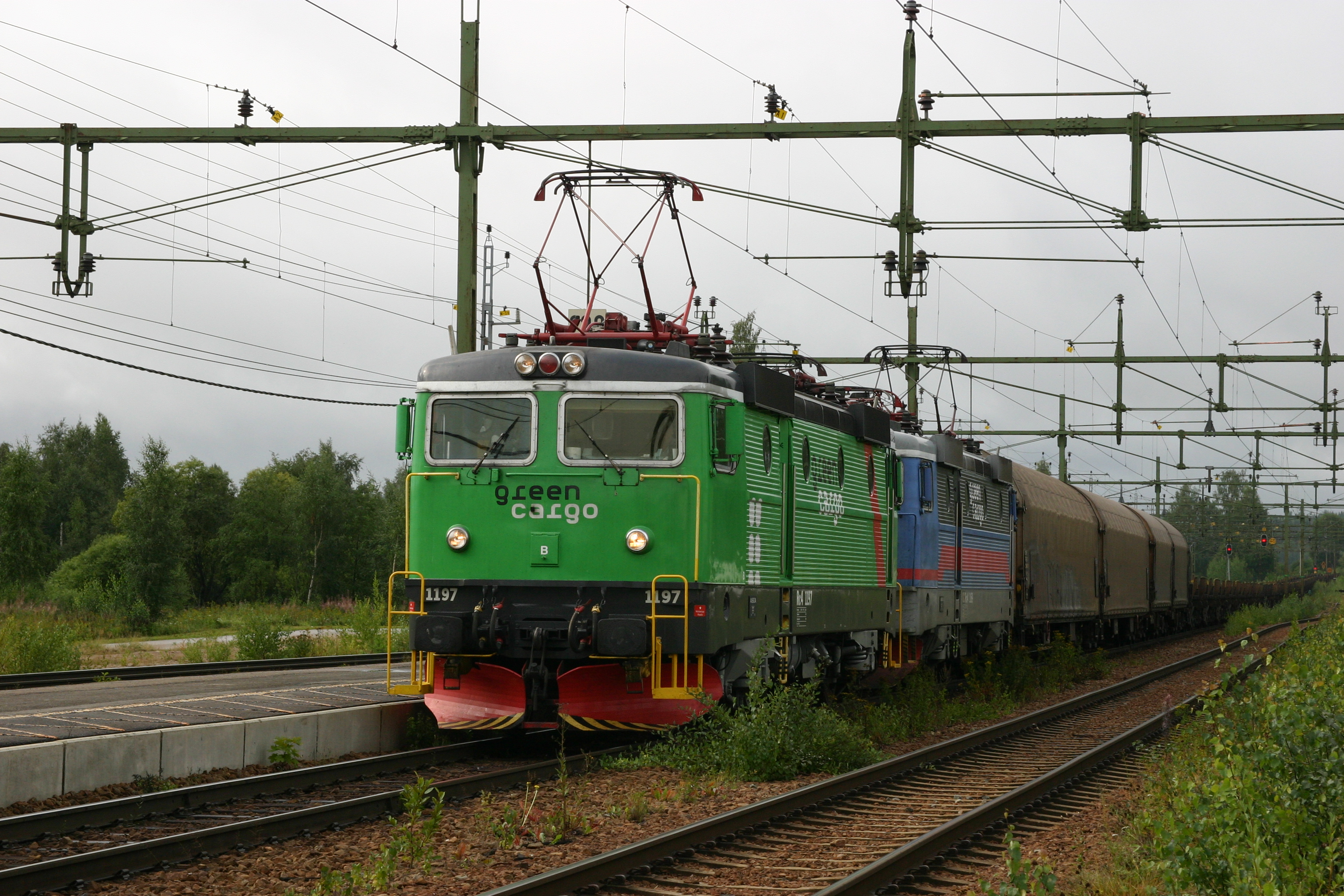 El-loket Rc4 1197 och Rc4 1169 i Ockelbo 13.08.08